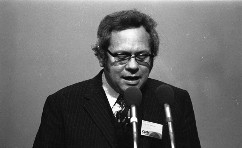 22. Bundesparteitag der CDU in Hamburg (Dietrich-Wilhelm Rollmann) 18.-20.11.1973